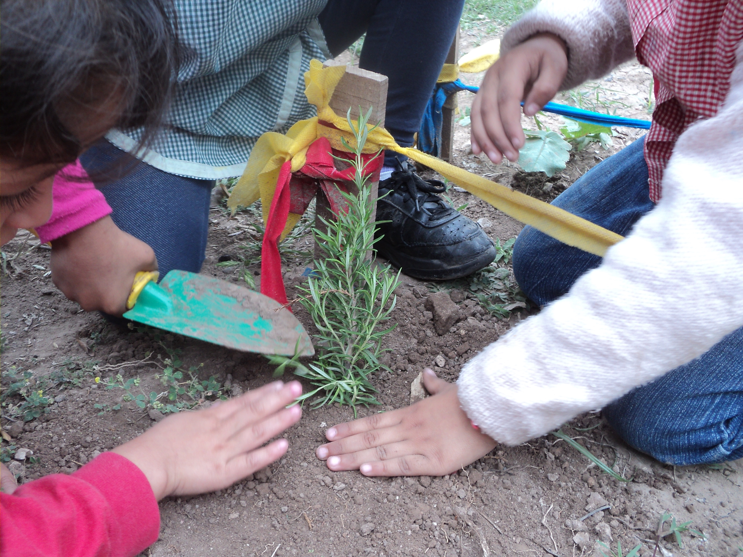 Trasplantando aromáticas. Argentina?